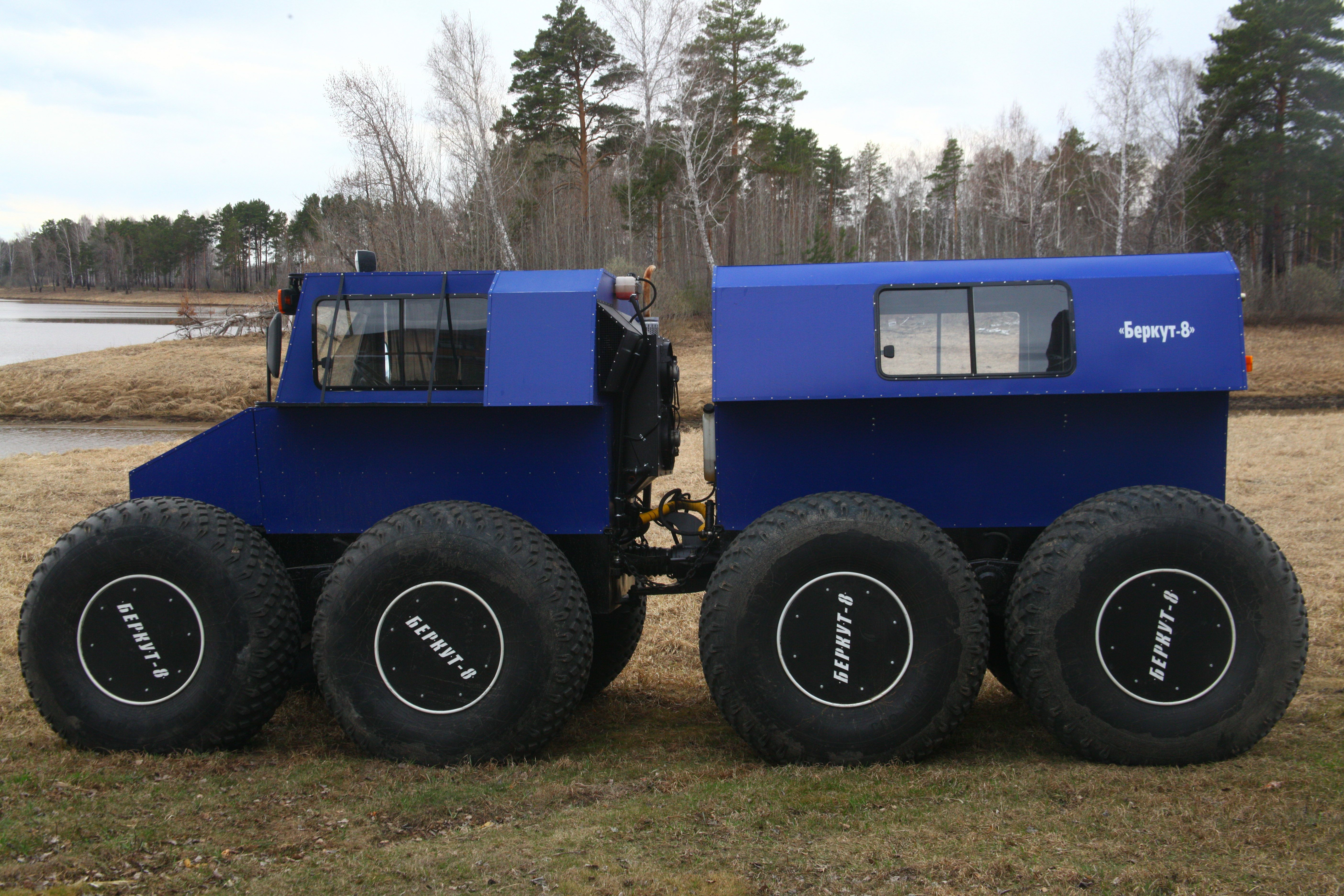 Беркут-8 второго поколения грузопассажирский